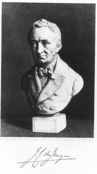 Jhr. Johannes Cornelis de Jonge (1793-1853) naar een gebeeldhouwde buste. Met handtekening in facsimile.